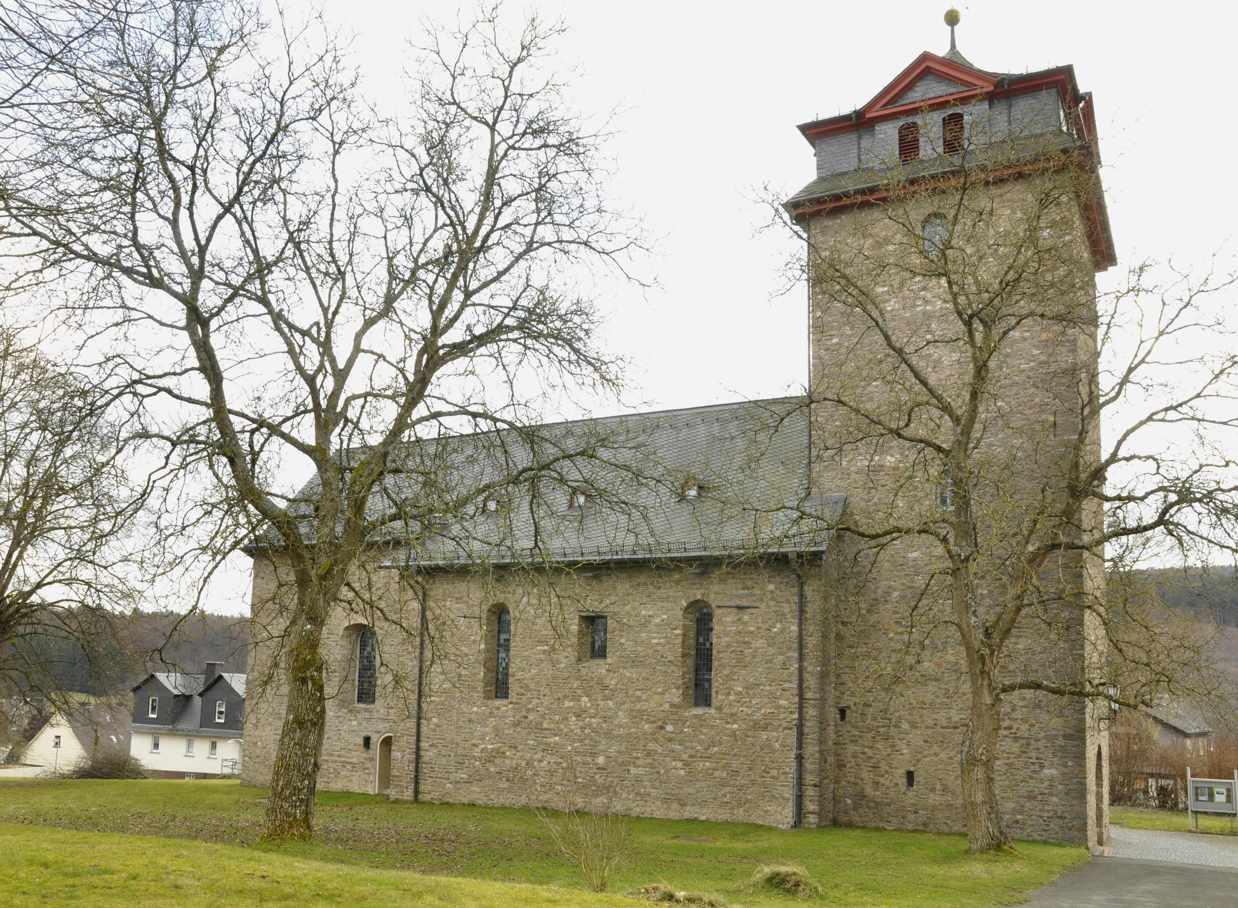 Ansicht von Norden